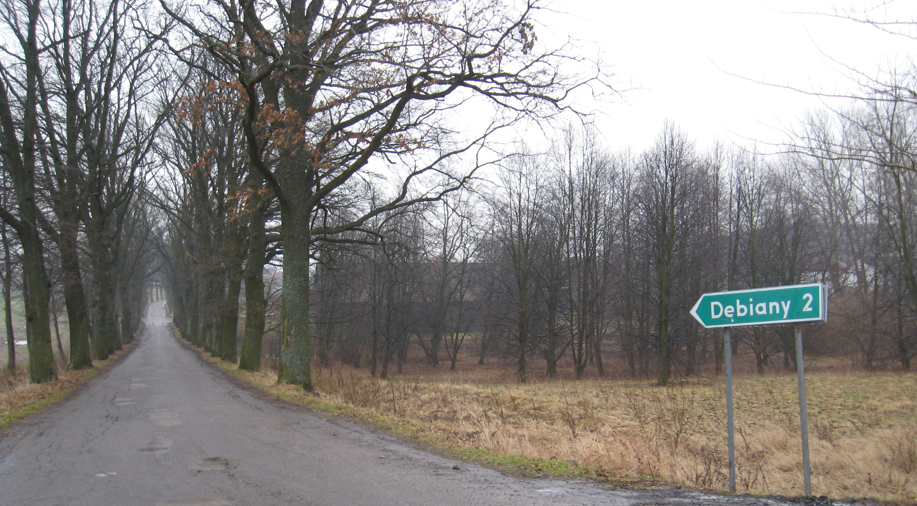 Rodele, Straße Richtung Dębiany von der Wojewodschaftsstraße 591 aus.